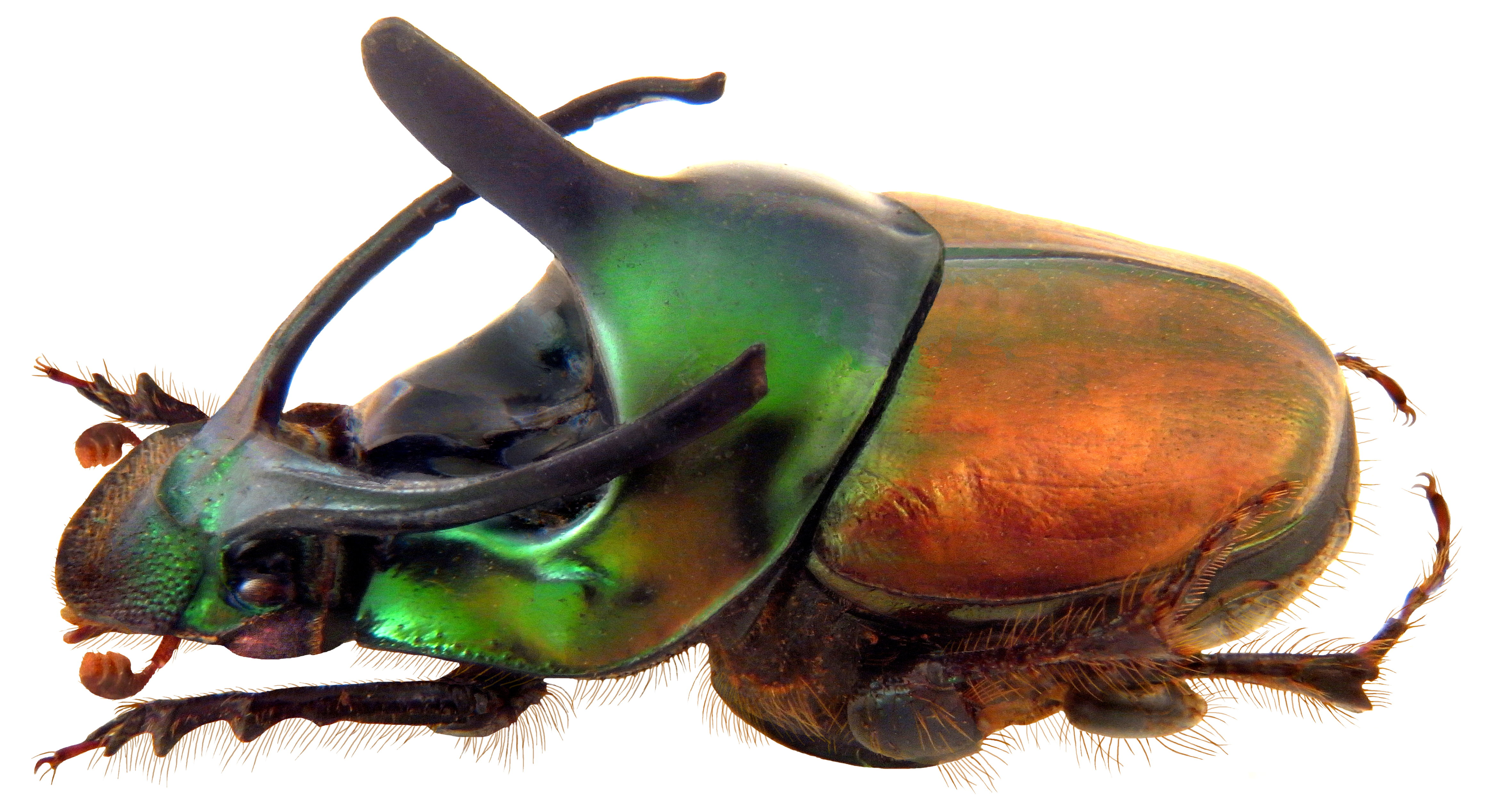 Familie: Scarabaeidae Groesse: 12 mm Fundort: Indien, Staat Shimoga, Mysore leg. P.S.Nathan, 1936; det. J.Scheuern, 1997 Photo: U.Schmidt, 2009